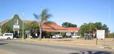 Главни трг у градићу Чиву, Зимбабве, снимљена 21 марта 2005, аутор Радован Корда